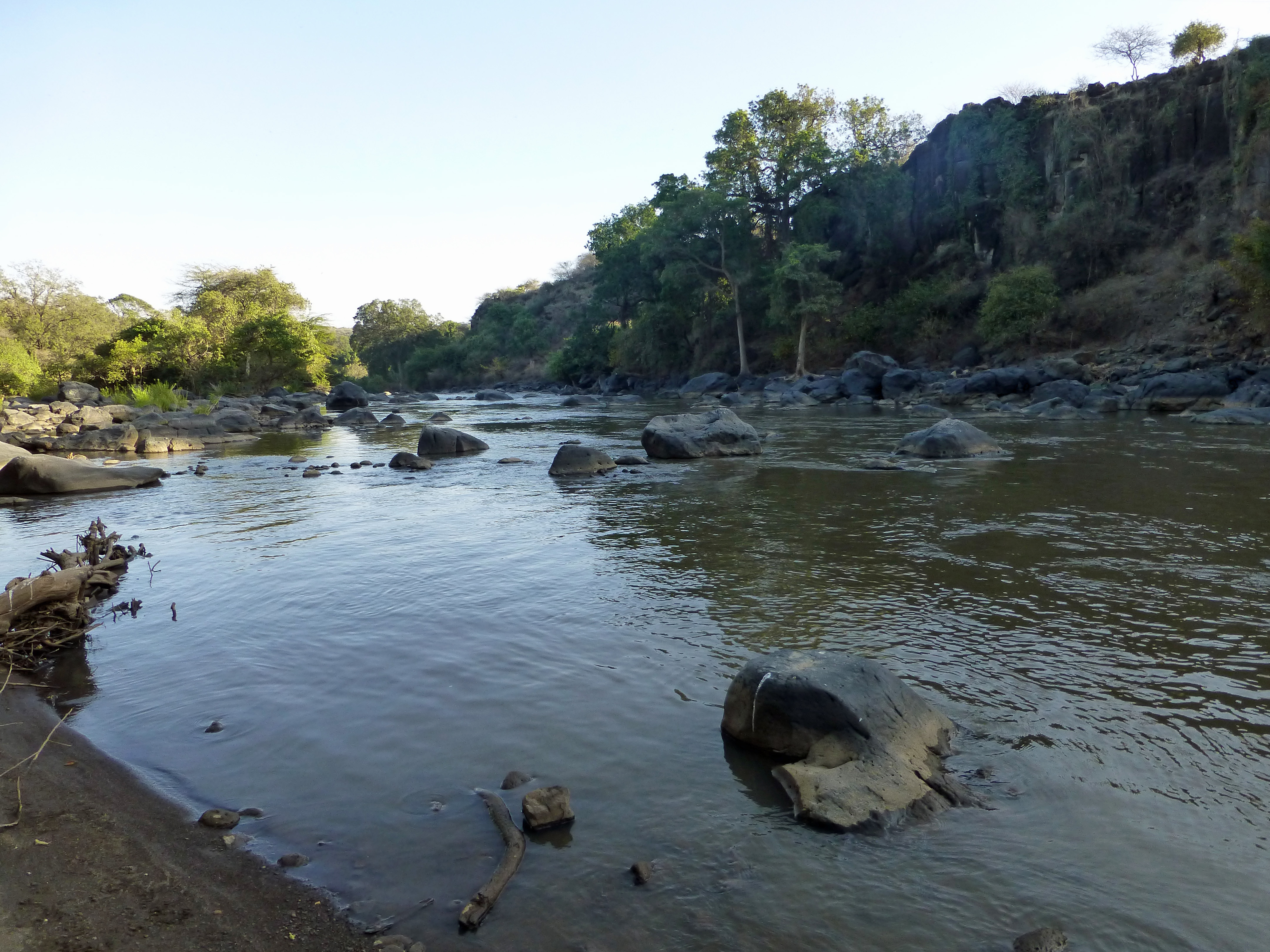 La rivière Awash au Parc national d'Awash (Ethiopie)